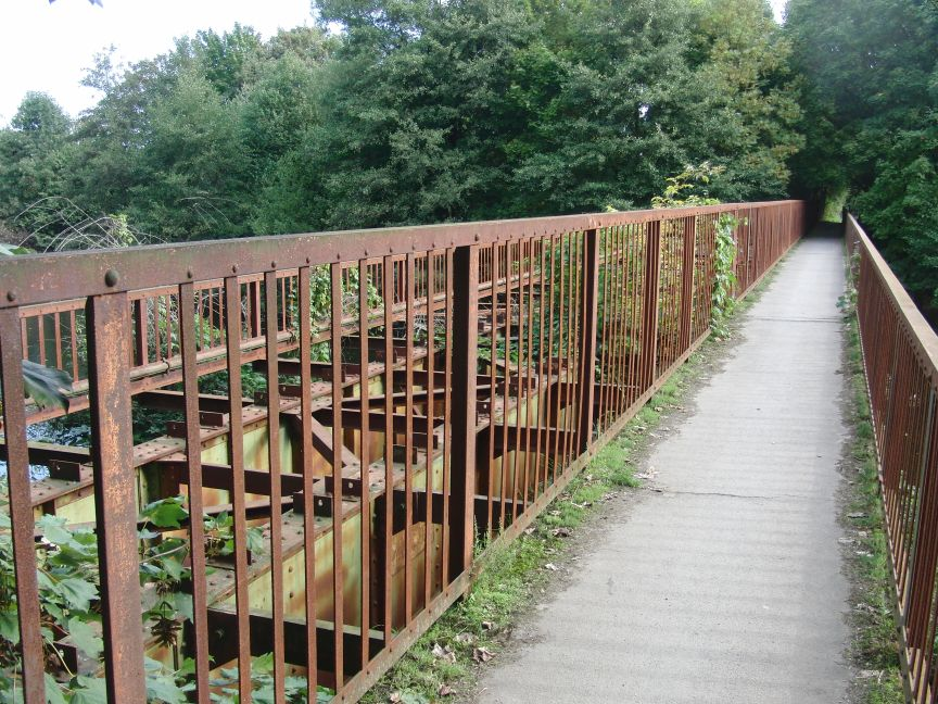 Fuß- und Fahrradweg auf der Rurbrücke der ehemaligen DKB-Ringbahn